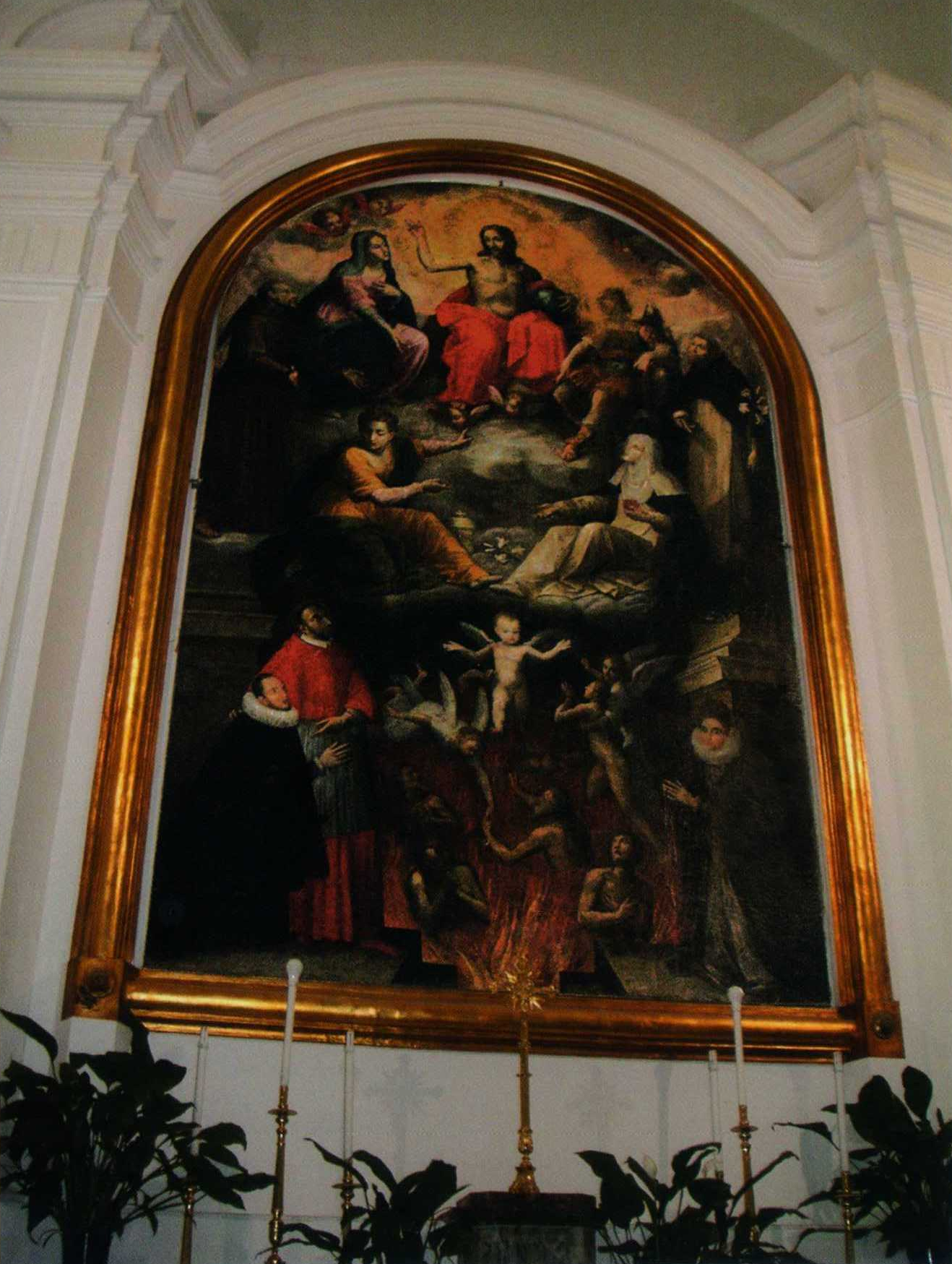 Pala d'altare